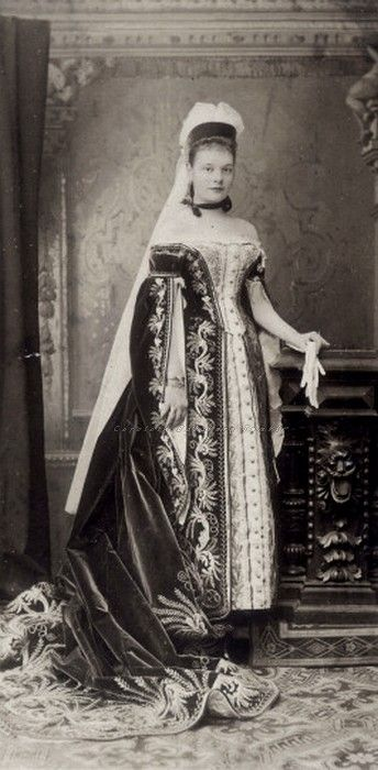 Княжна Надежда Ивановна Дуроново (1869-1898), в браке с А. Н. Синельниковым (1850—1923)